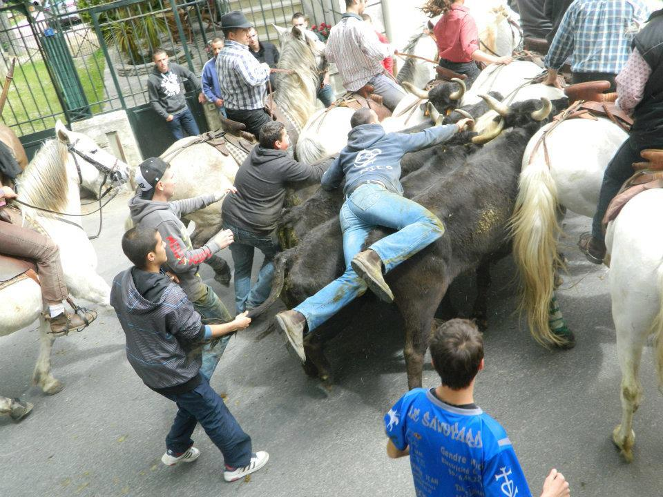 Attrapaire de taureaux. Un Attrapaïre est un homme, généralement jeune, qui attrape les taureaux de Camargue lors de leur passage au cours des Abrivado et des Bandido.